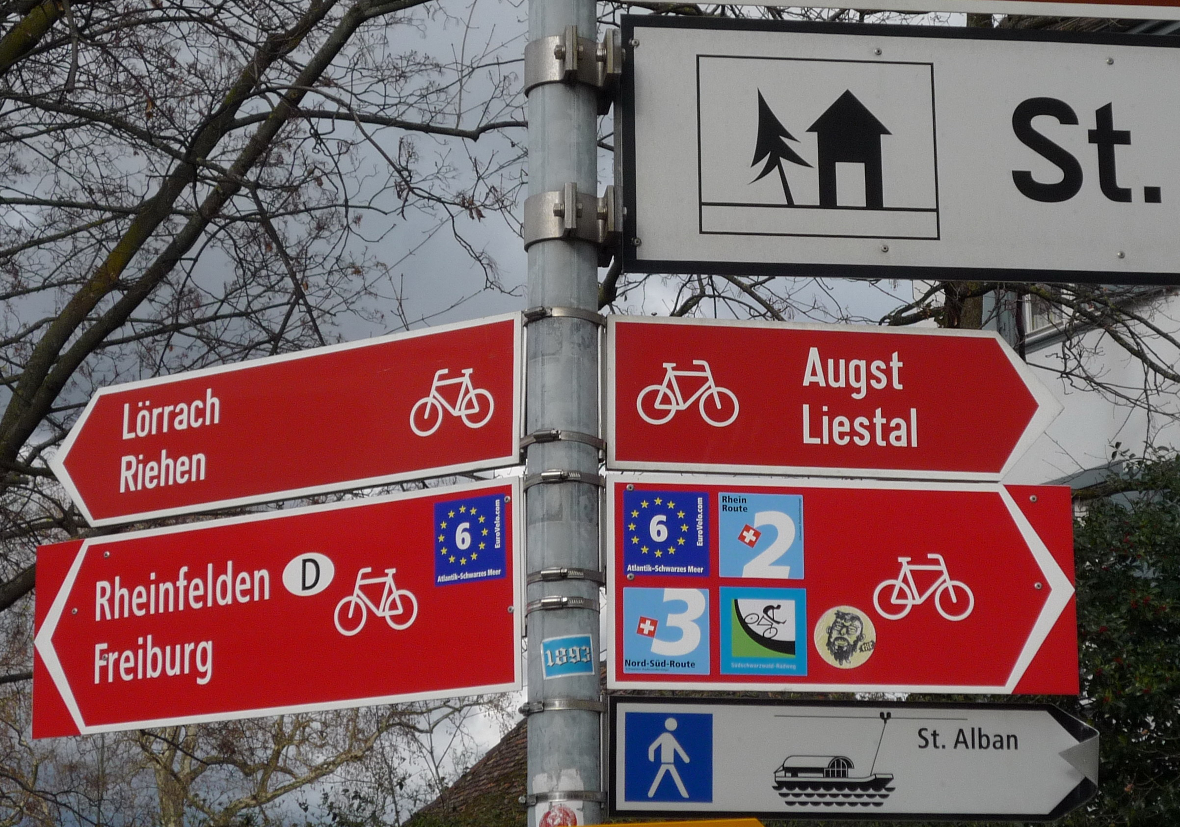 Schweizer Radwegweiser in Basel am Kunstmuseum 2010. Der Wegweiser weist links über die Wettsteinbrücke und rechts zum linken Rheinufer zum Stadtteil St. Alban: EuroVelo 6, Rhein-Route 2, Nord-Süd-Route 3 u. Südschwarzwald-Radweg